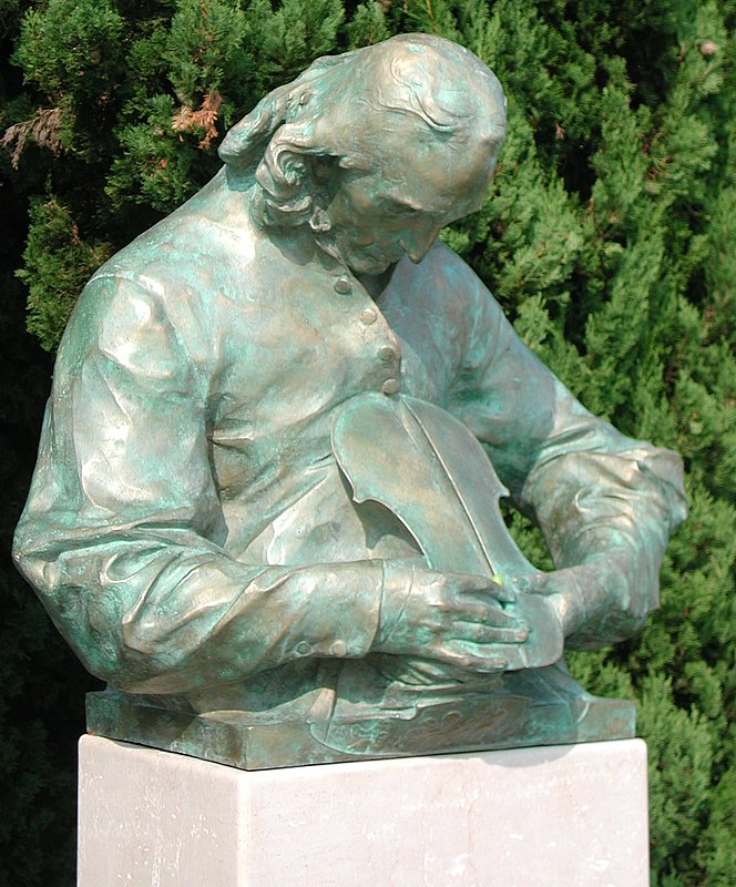 Gasparo da Salò (1540 - 1609) liutaio, in Salò